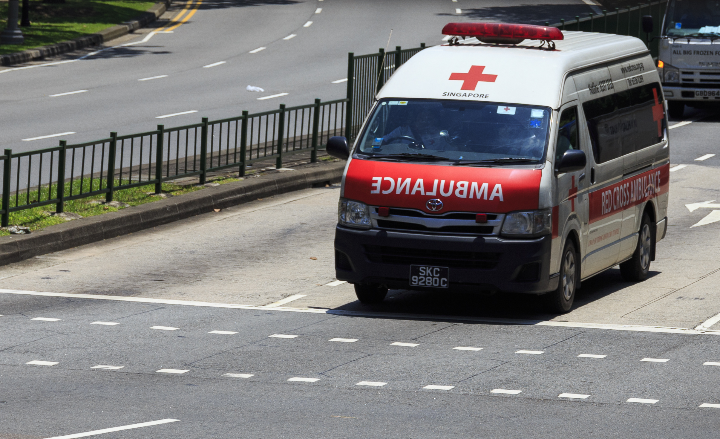 singapur-australien-neuseeland-013